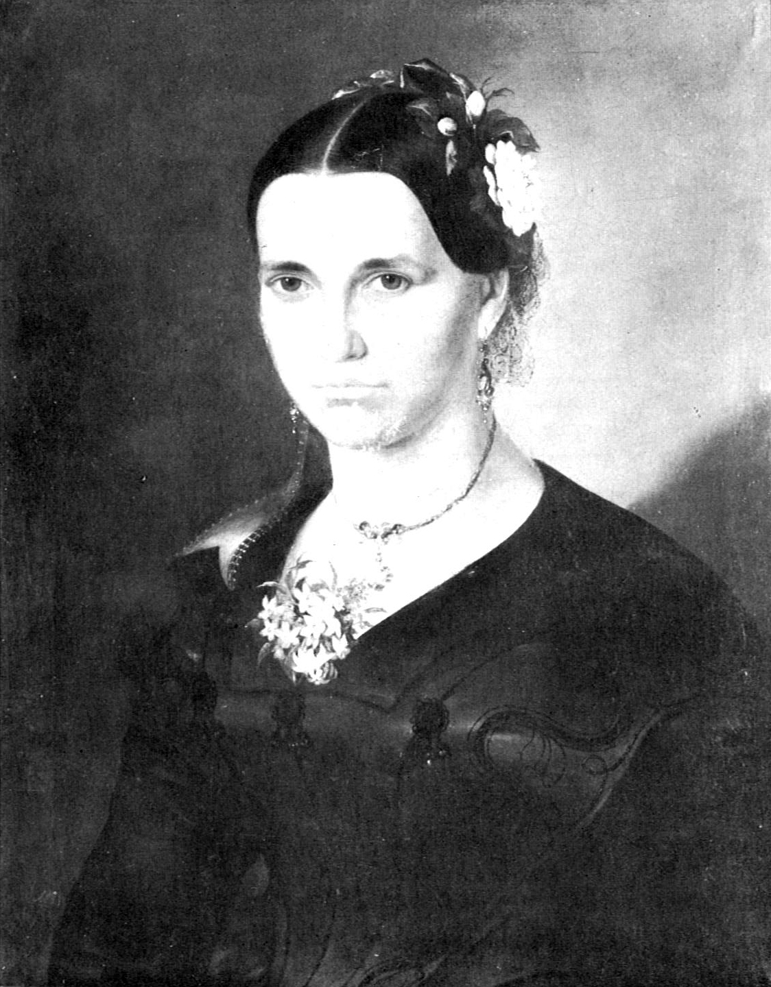 Genoveva Kreuzer, Ehefrau Conrad Kreuzers